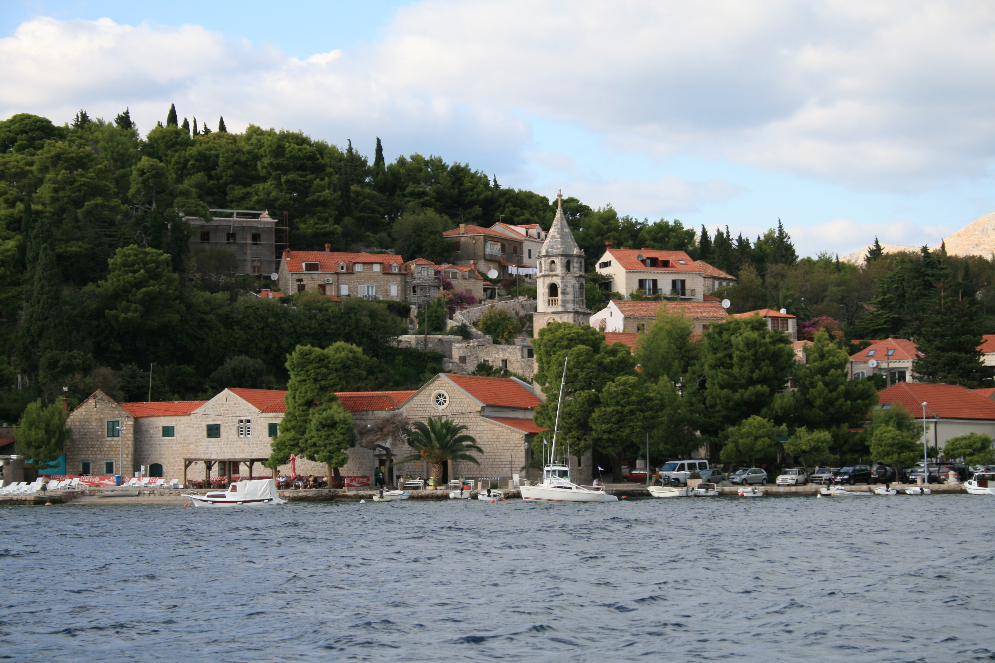 Вид на Цавтат (Хорватия) с моря